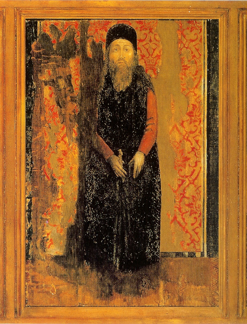 Tabla de un tríptico portugués del s. XV, procedente del monasterio de Batalha, con la imagen del Santo Infante Fernando de Portugal